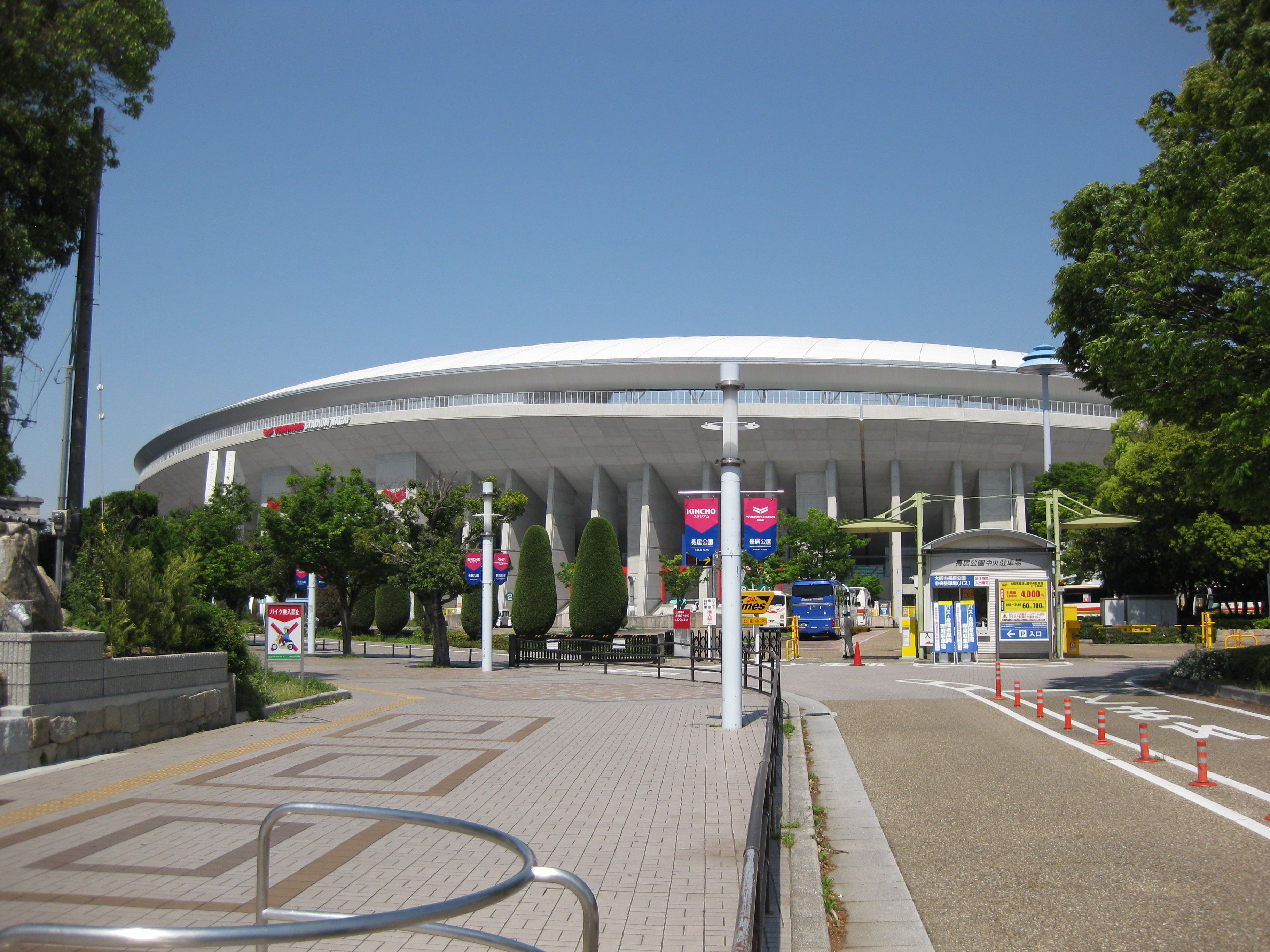 ヤンマースタジアム長居（長居陸上競技場）